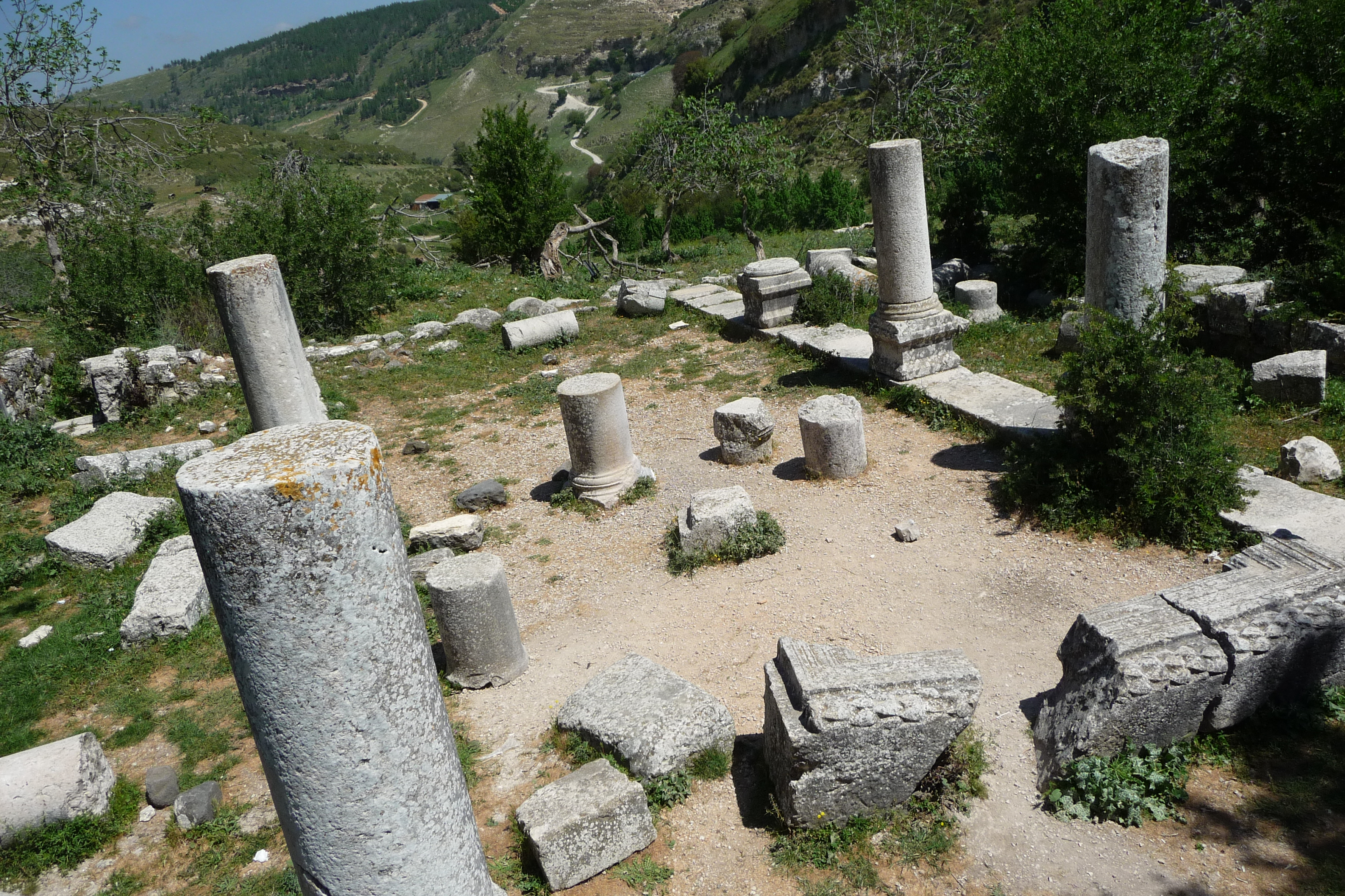 לרגלי הכפר, נמשך לצפון-מזרח כביש לאורך נחל גוש חלב. כביש זה מסתיים בדרך ובשביל. כעבור כמחצית ק"מ מתוי כרם תאנים ובתוכו שרידי בית כנסת קדום.